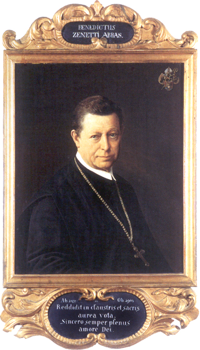 Benediktinerabt Benedikt Zenetti, München